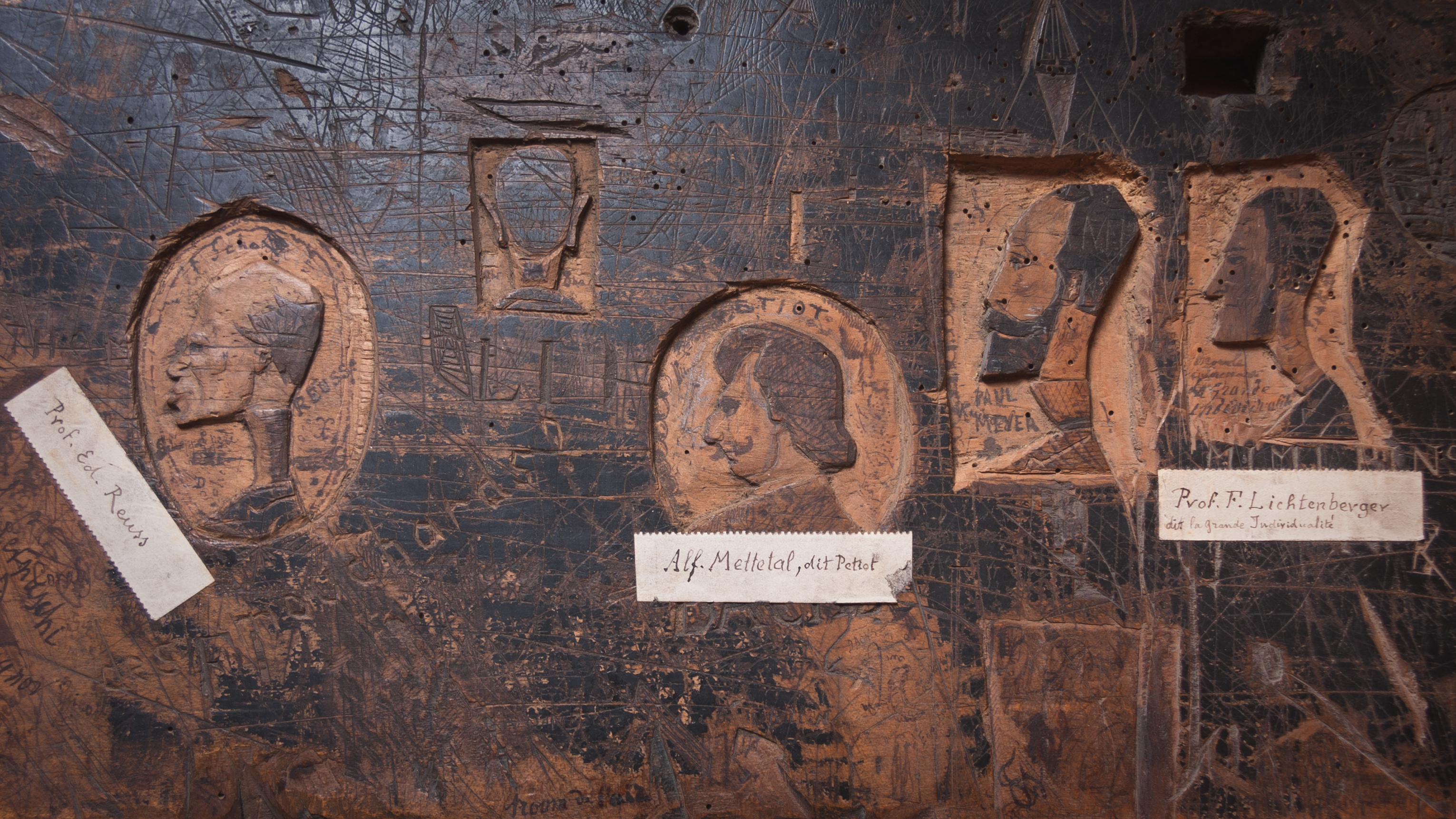 Caricatures des professeurs de la Faculté de théologie protestante de Strasbourg, gravées sur un pupitre au cours des années 1860. On peut y voir Édouard Guillaume Eugène Reuss et Frédéric Lichtenberger - coll. Médiathèque protestante de Strasbourg.